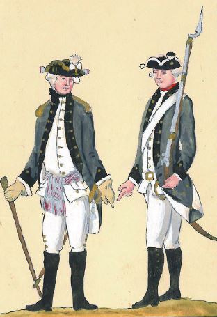 31. Regiment artylerii. [Regiment fizylierów artylerii koronnej]